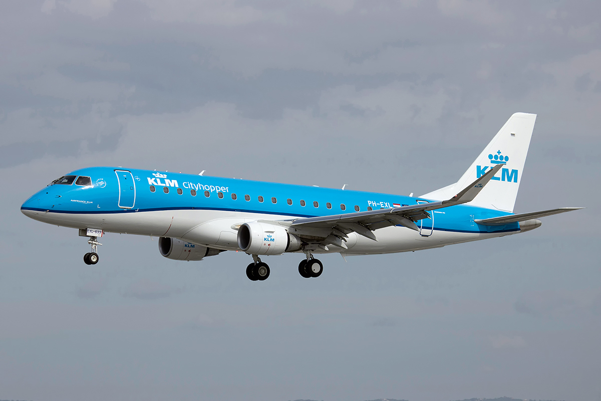 Reg: PH-EXL Aircraft: Embraer 170-200STD Airline: KLM Cityhopper Serial #: 17000633 at Faro - LPFR Portugal on delivery flight